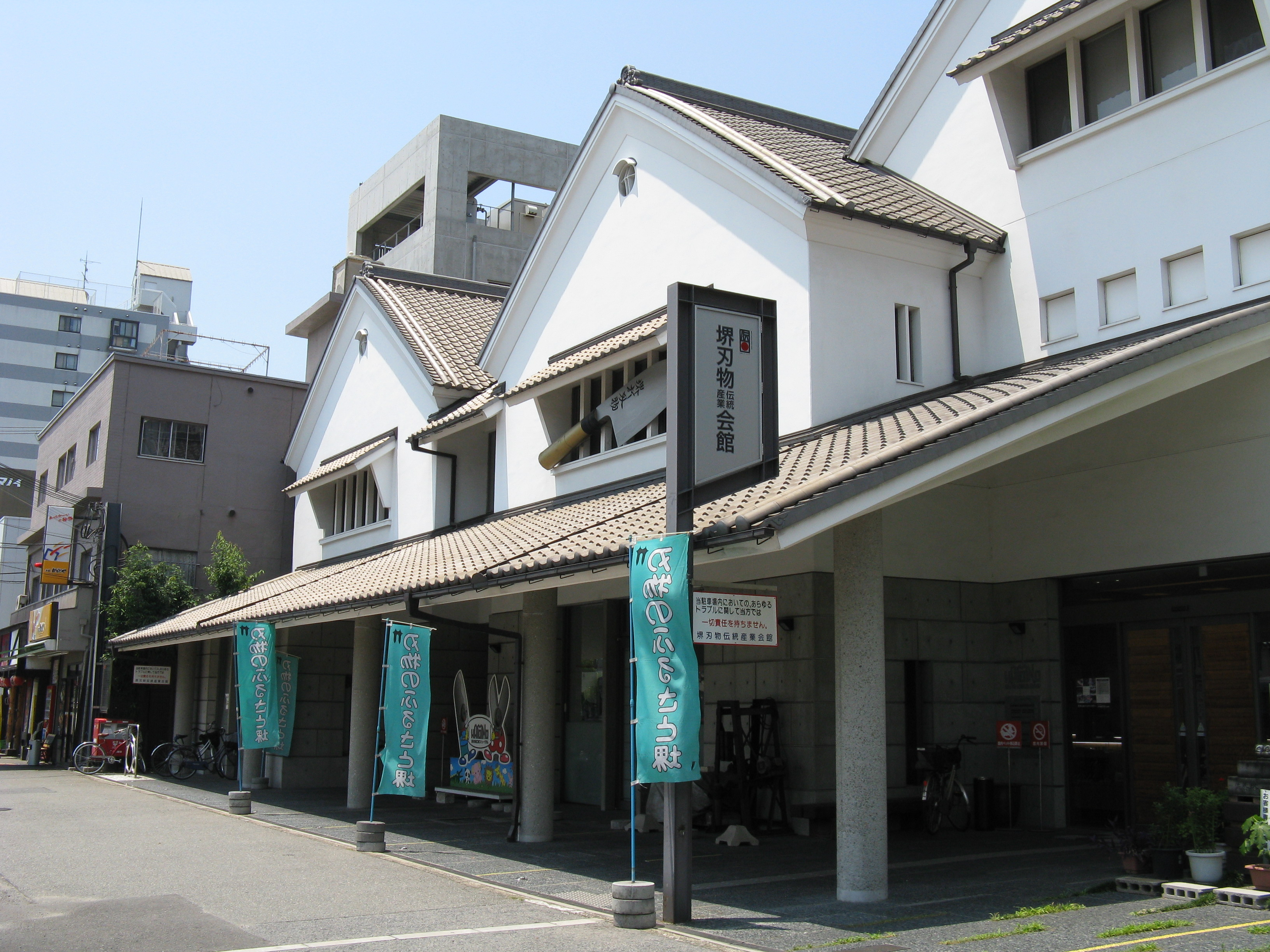 堺HAMONOミュージアム（堺刃物伝統産業会館）